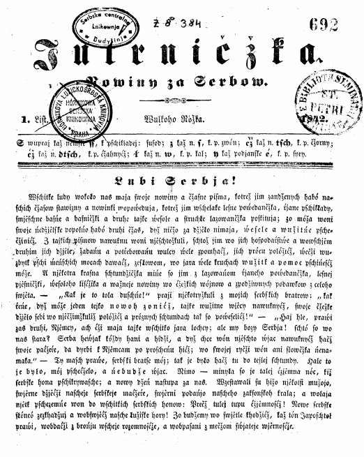 Номер за 1842 год